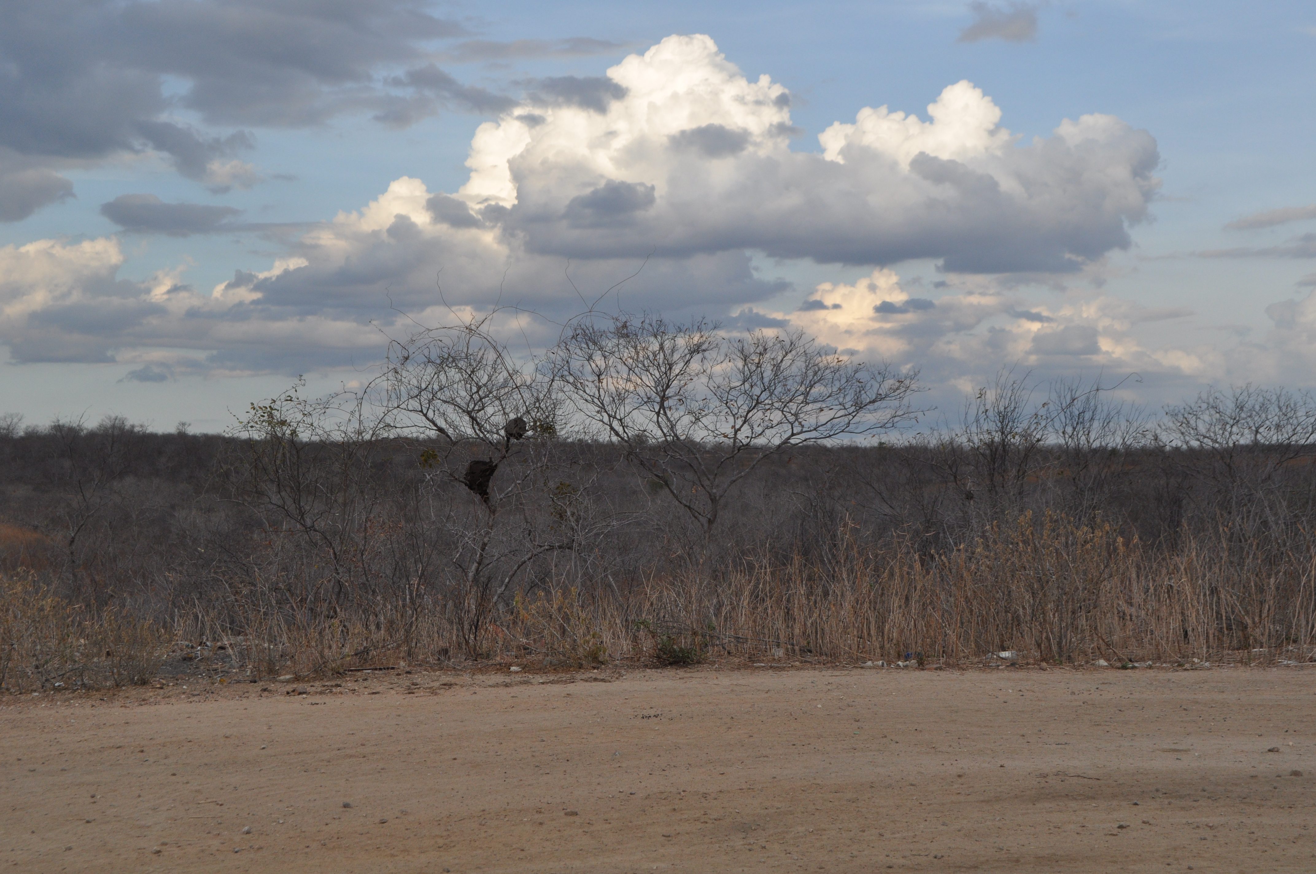 Foto tirada no município de Madalena, sertão cearense (CE). Local não chovia já três anos.